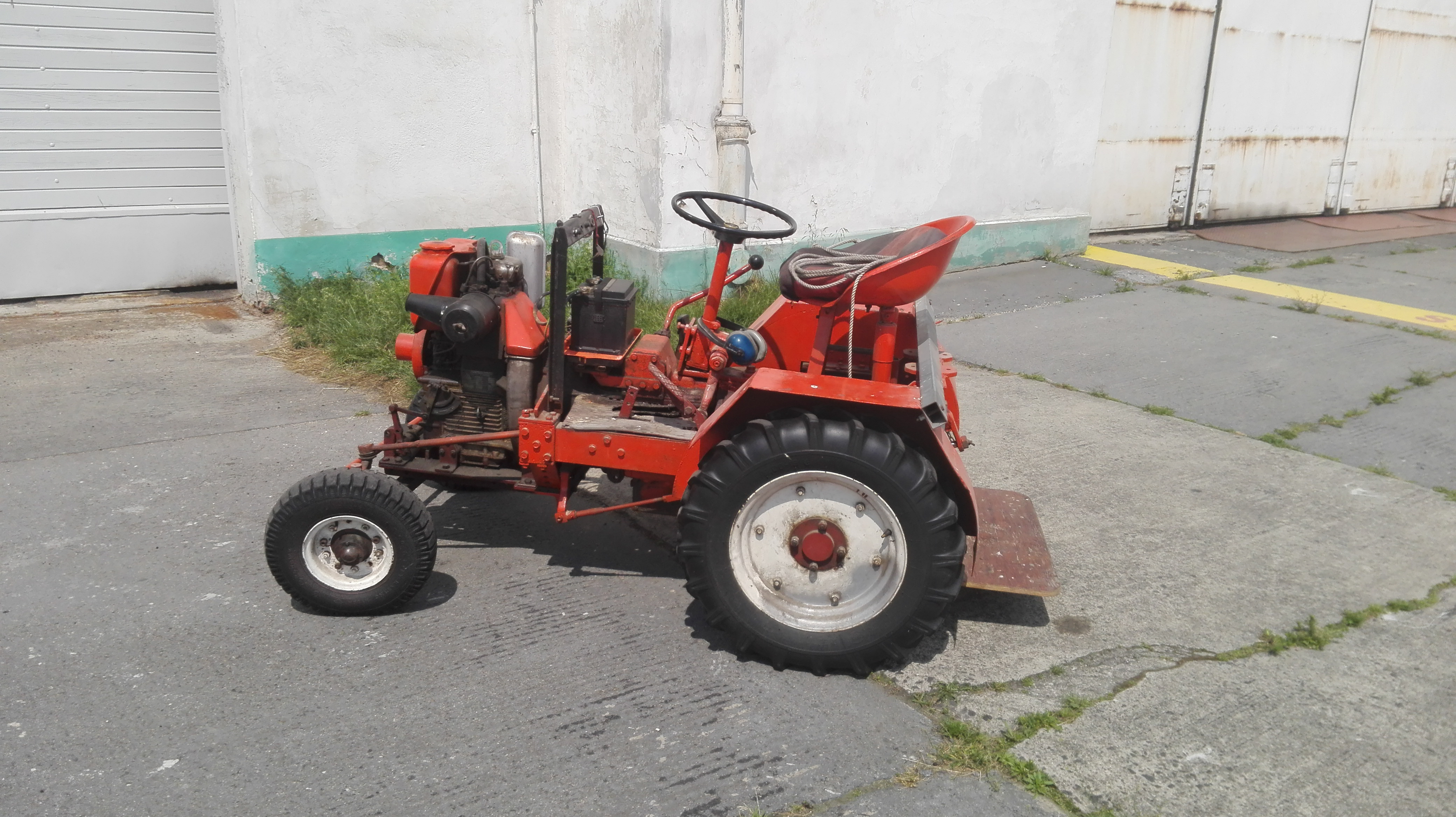 „Gucio“ do ściągania liny wyciągarkowej — Aeroklub Gliwicki